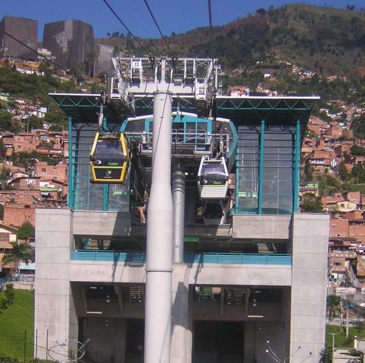 Metro de Medellín, Estación Popular. Medellín, Colombia.